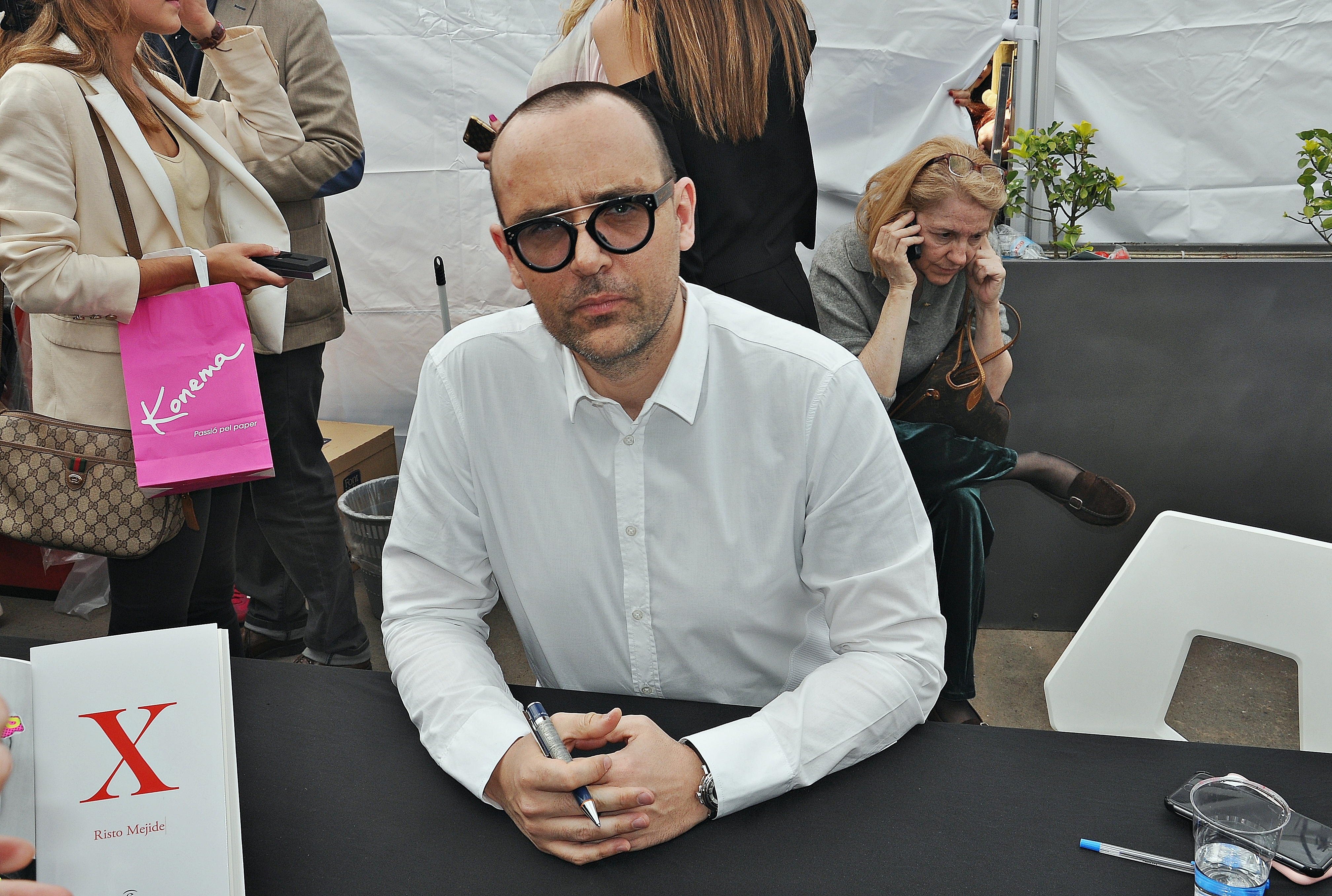 Firma de libros en la Rambla de Cataluña